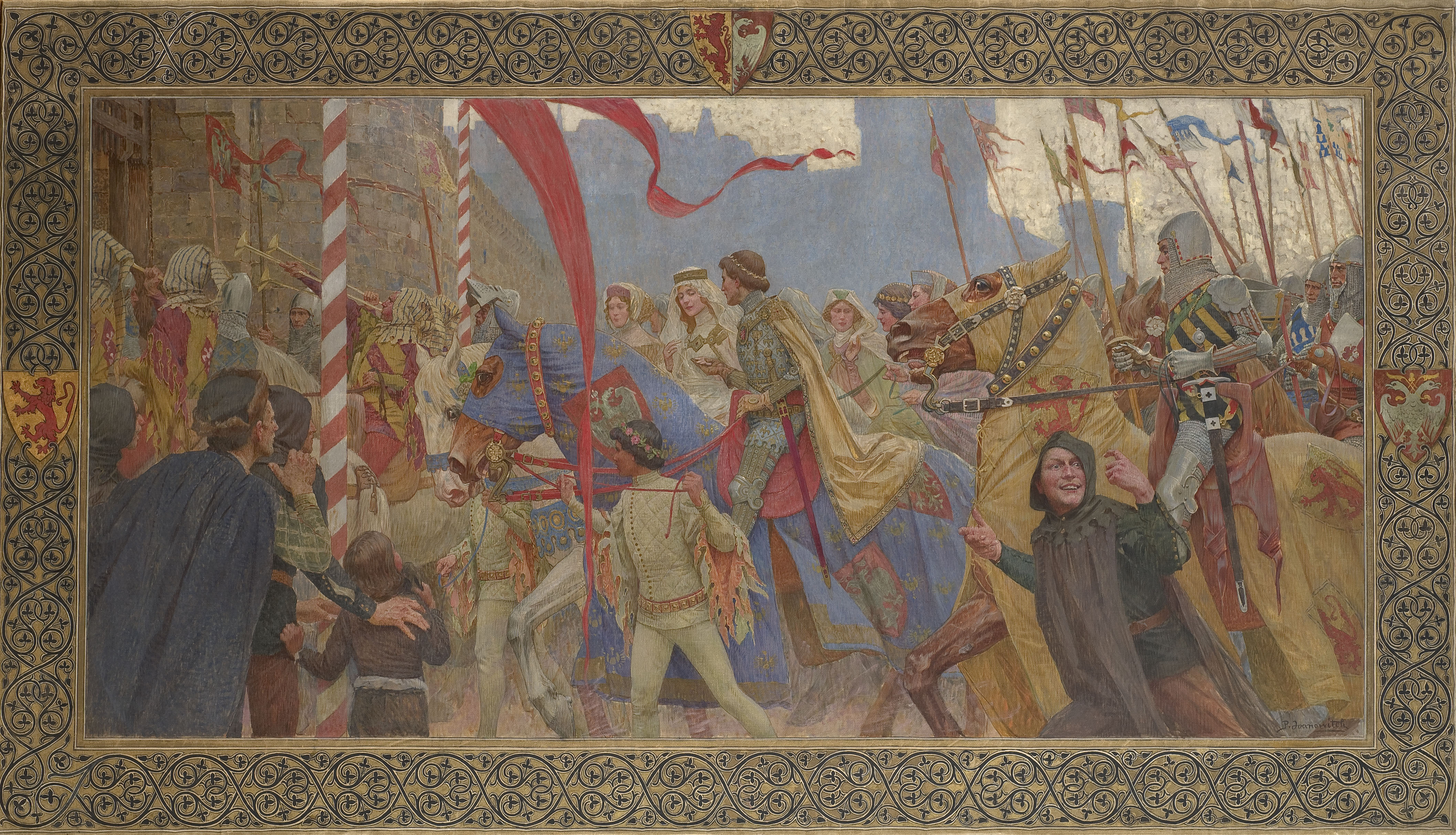 "Женитьба царя Душана", Пая Йованович